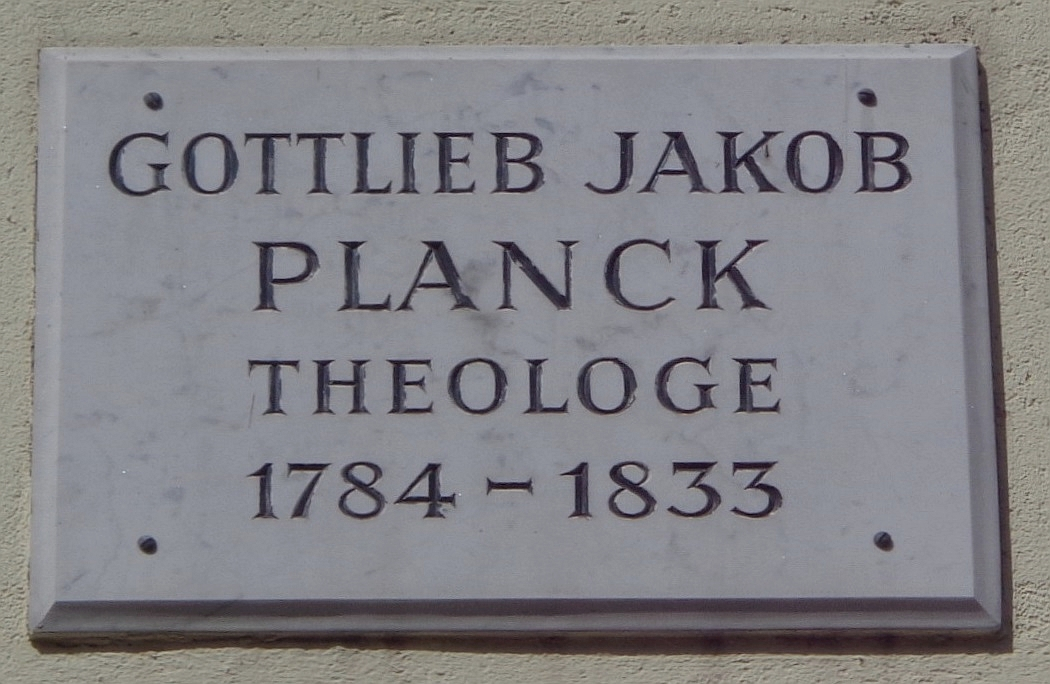 Göttinger Gedenktafel für Gottlieb Jakob Planck (Hainholzweg 42)